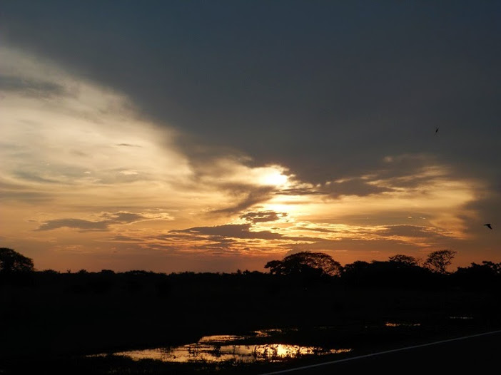 Hermoso atardecer que se observó en la orilla occidental de la ciénaga de Guatizo, en San Fernando (Bolívar).